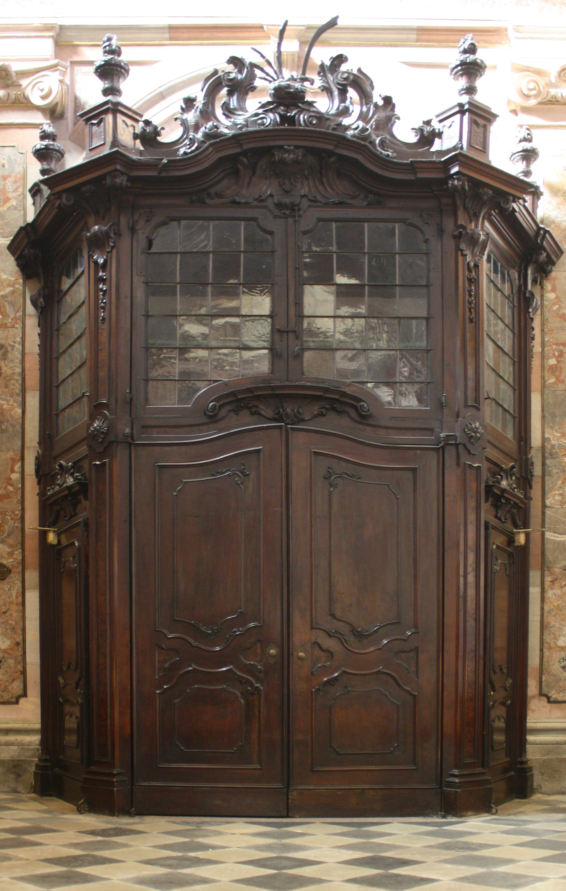 Bussola d'ingresso, opera di Biagio Bellotti, nella navata centrale della basilica di San Giovanni a Busto Arsizio.